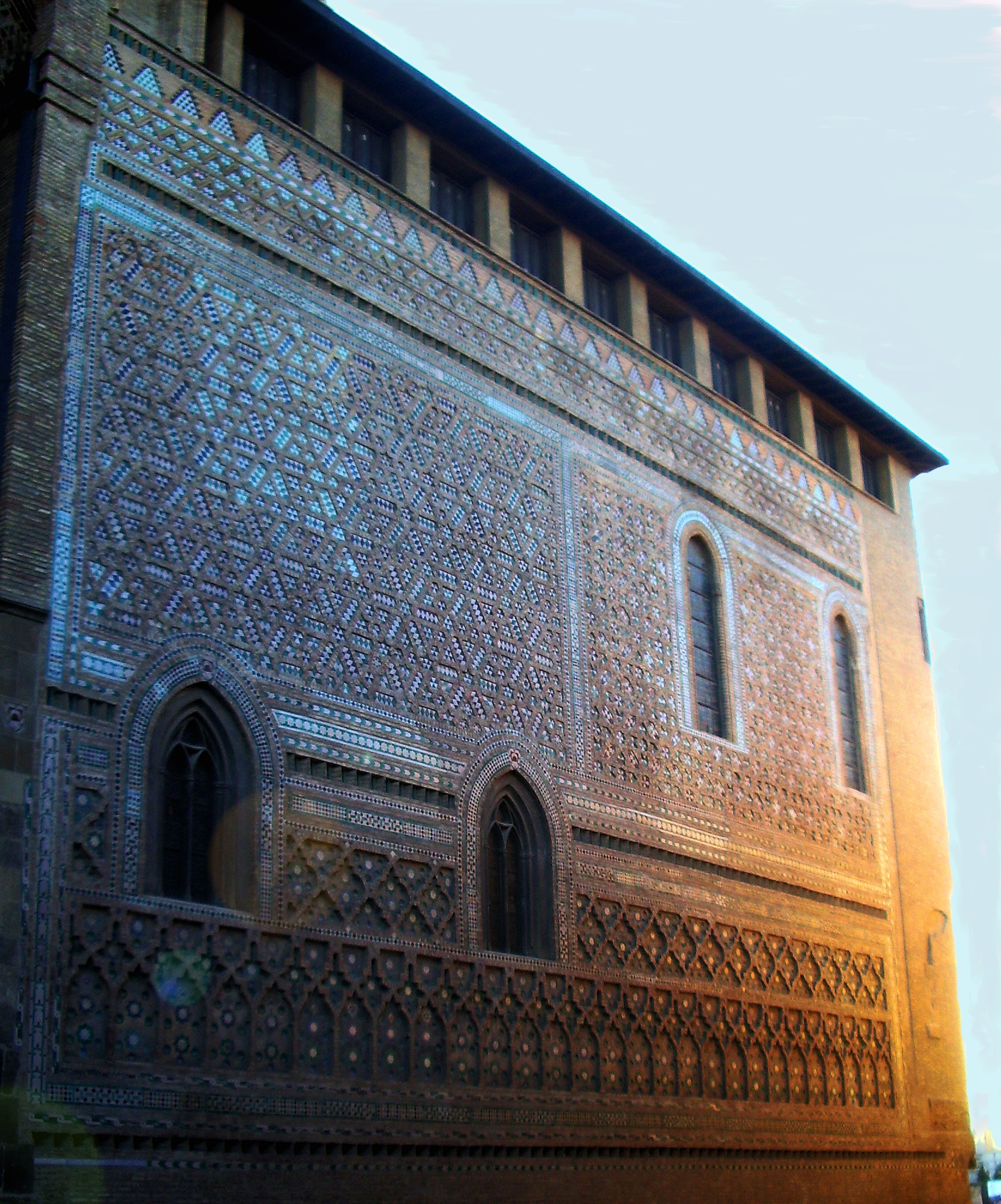 Fachada de la Parroquieta de la catedral de La Seo de Zaragoza (siglo XIV)